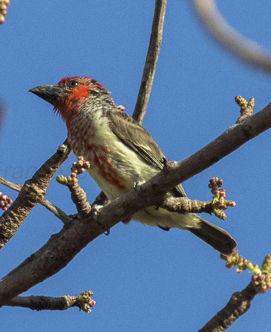 Viellot's Barbet - Gambia 17CD5A0042